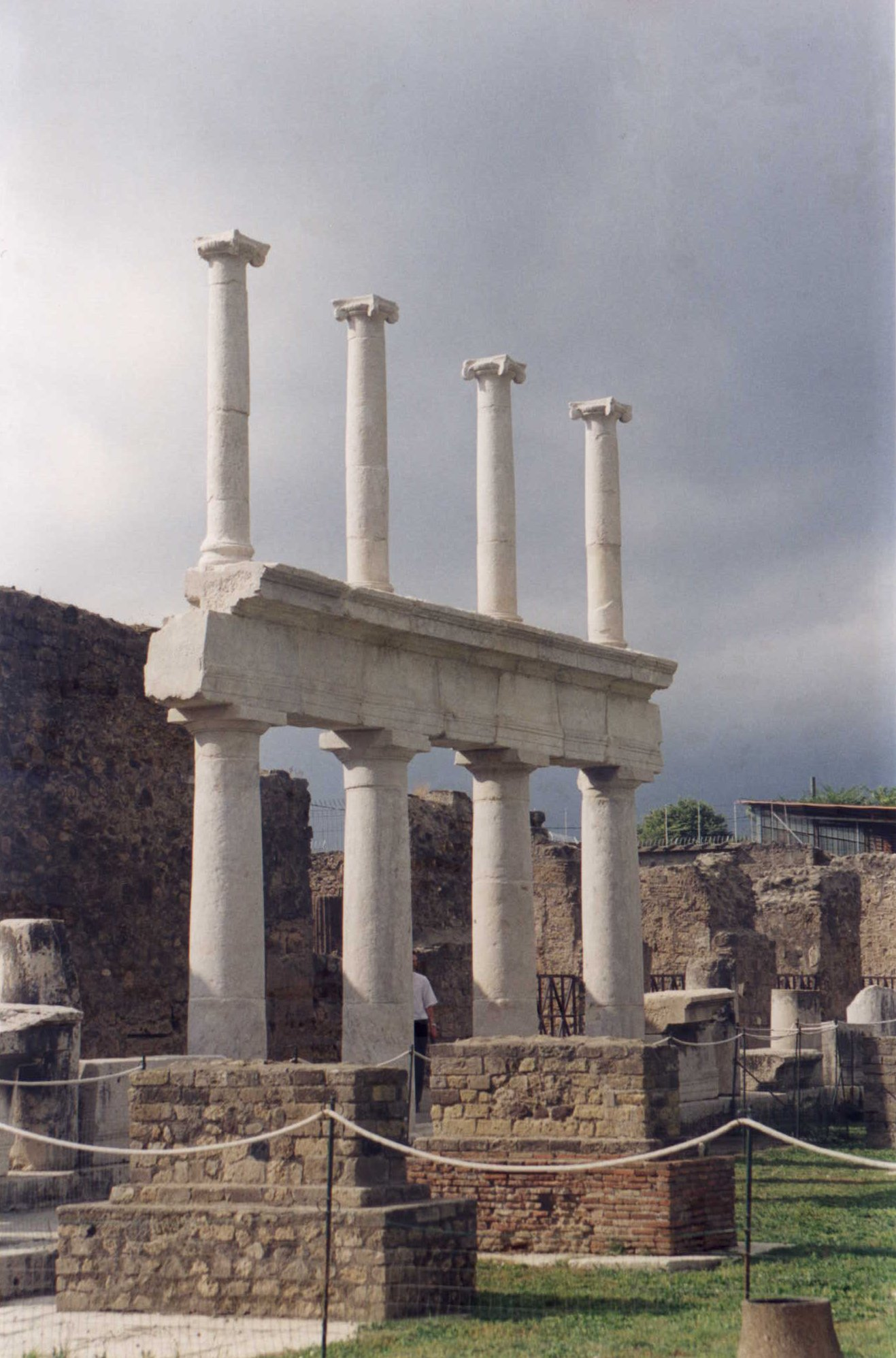 Foro de Pompeya